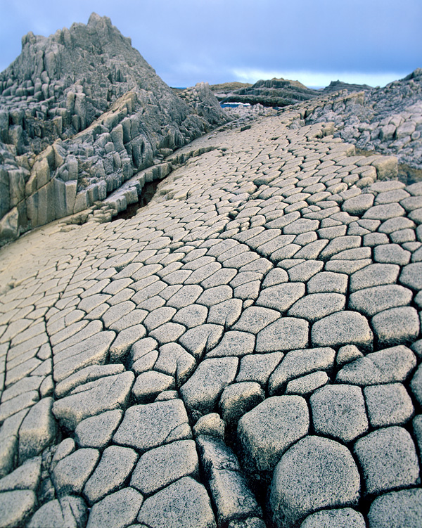 мыс Столбчатый на Кунашире